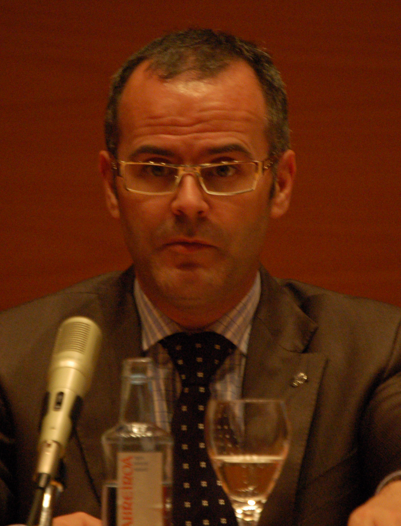 Xesús/Jesús Vázquez Abad, político español